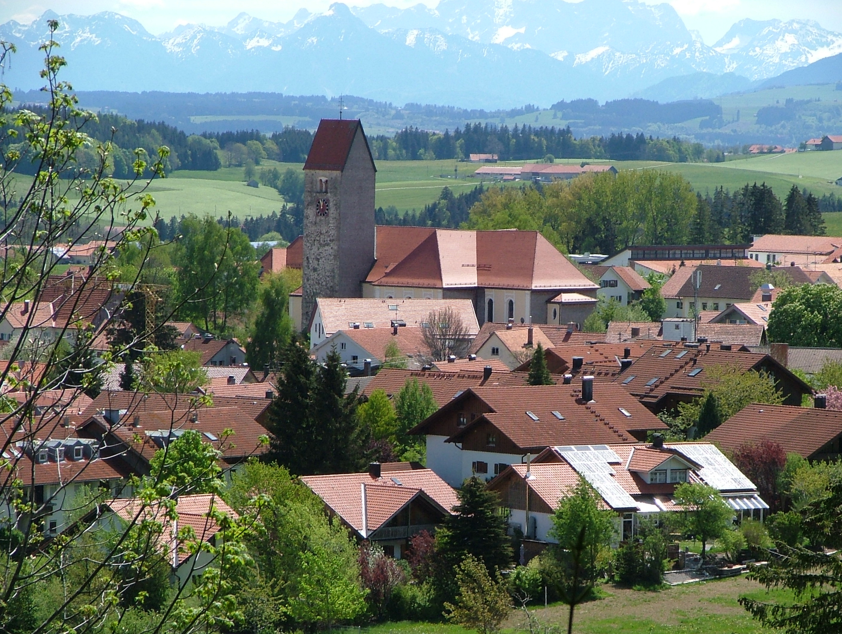 Wiggensbach